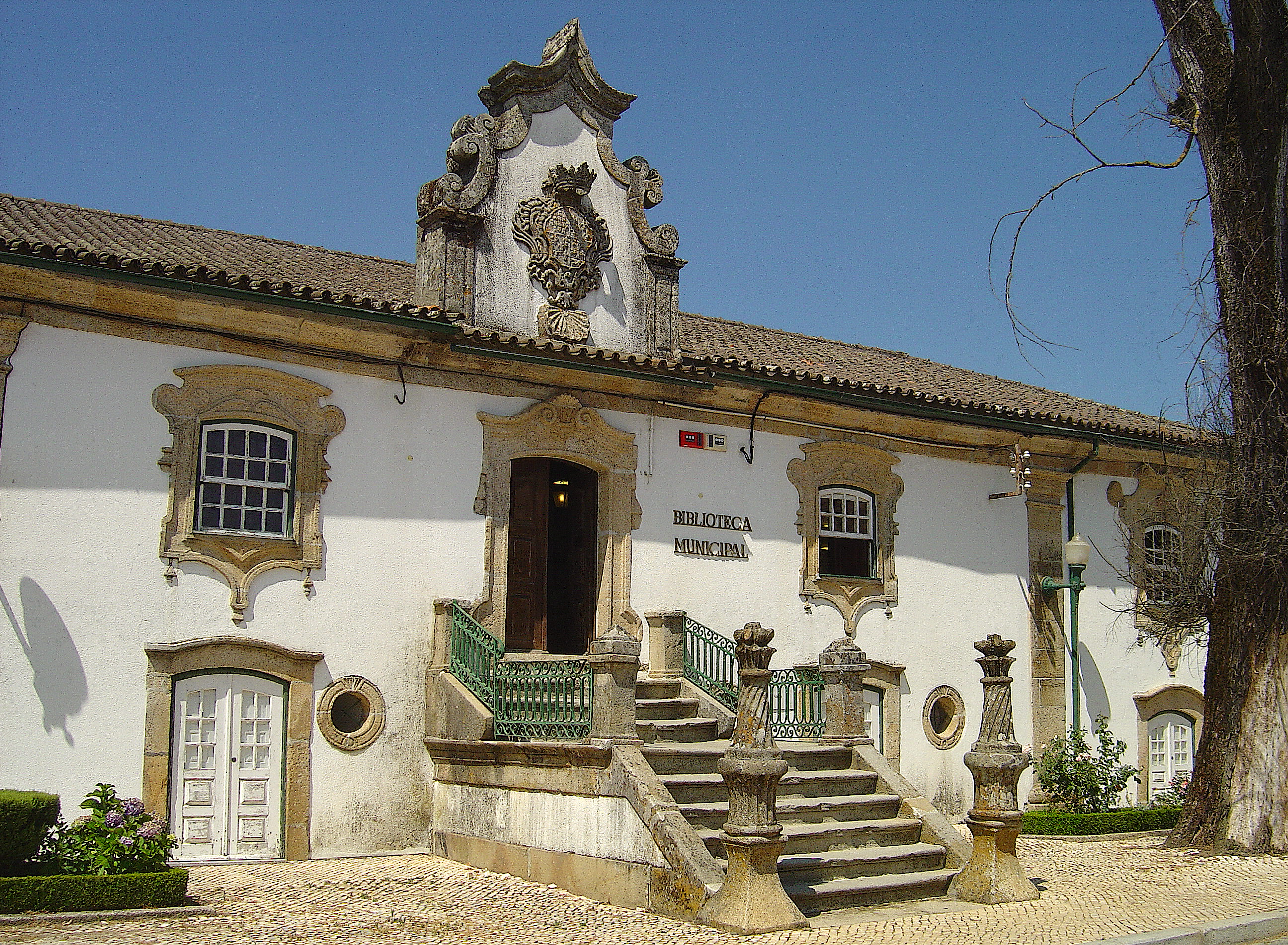 Antigo e nobre solar reconvertido em biblioteca municipal.